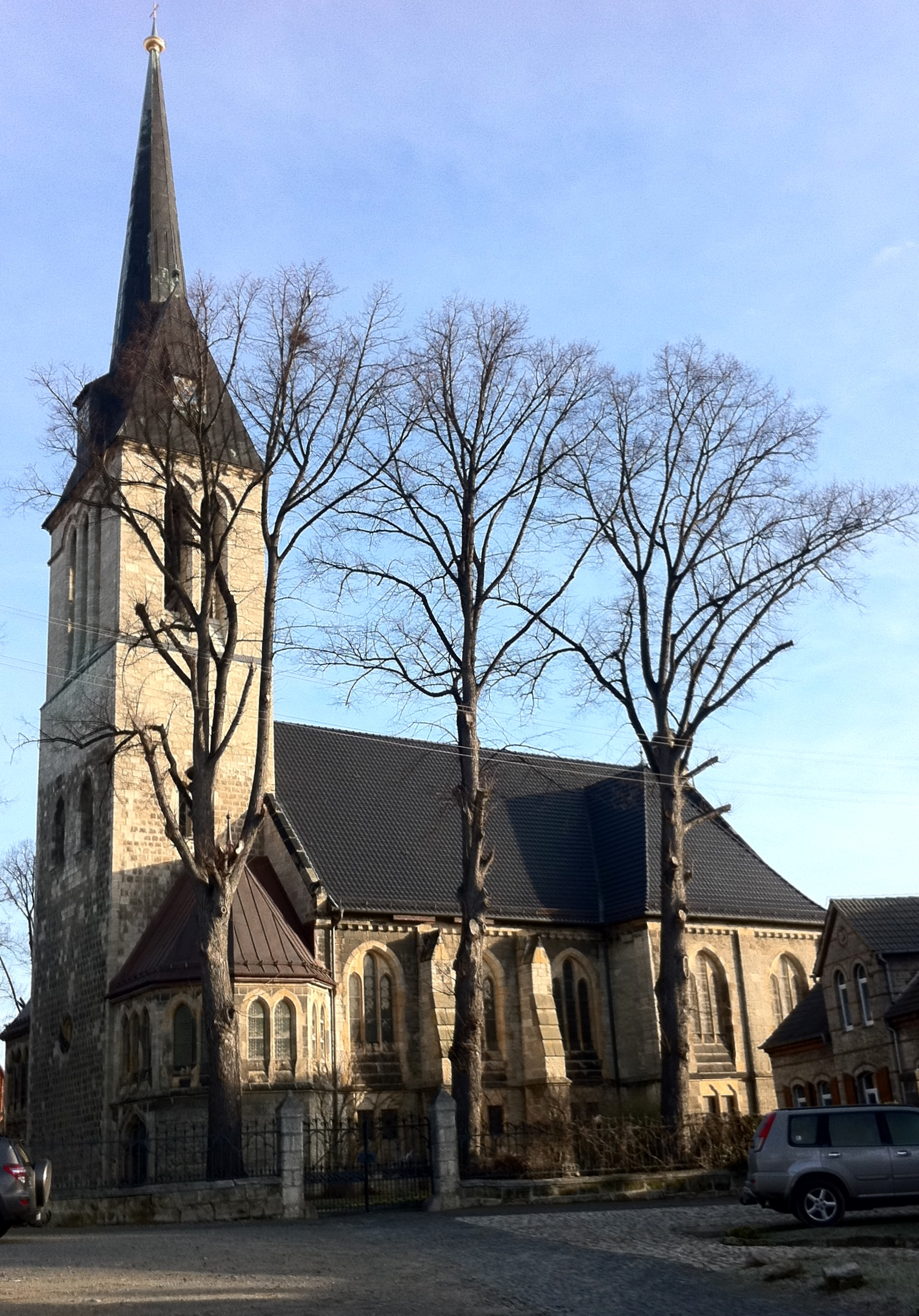 Sankt-Bonifatius-Kirche in Ditfurt